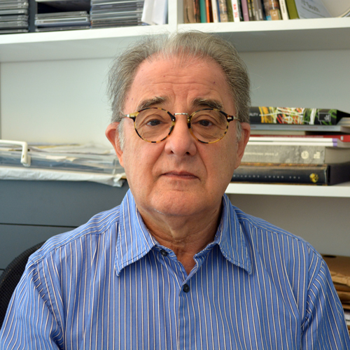 Héctor Vigliecca, 2014